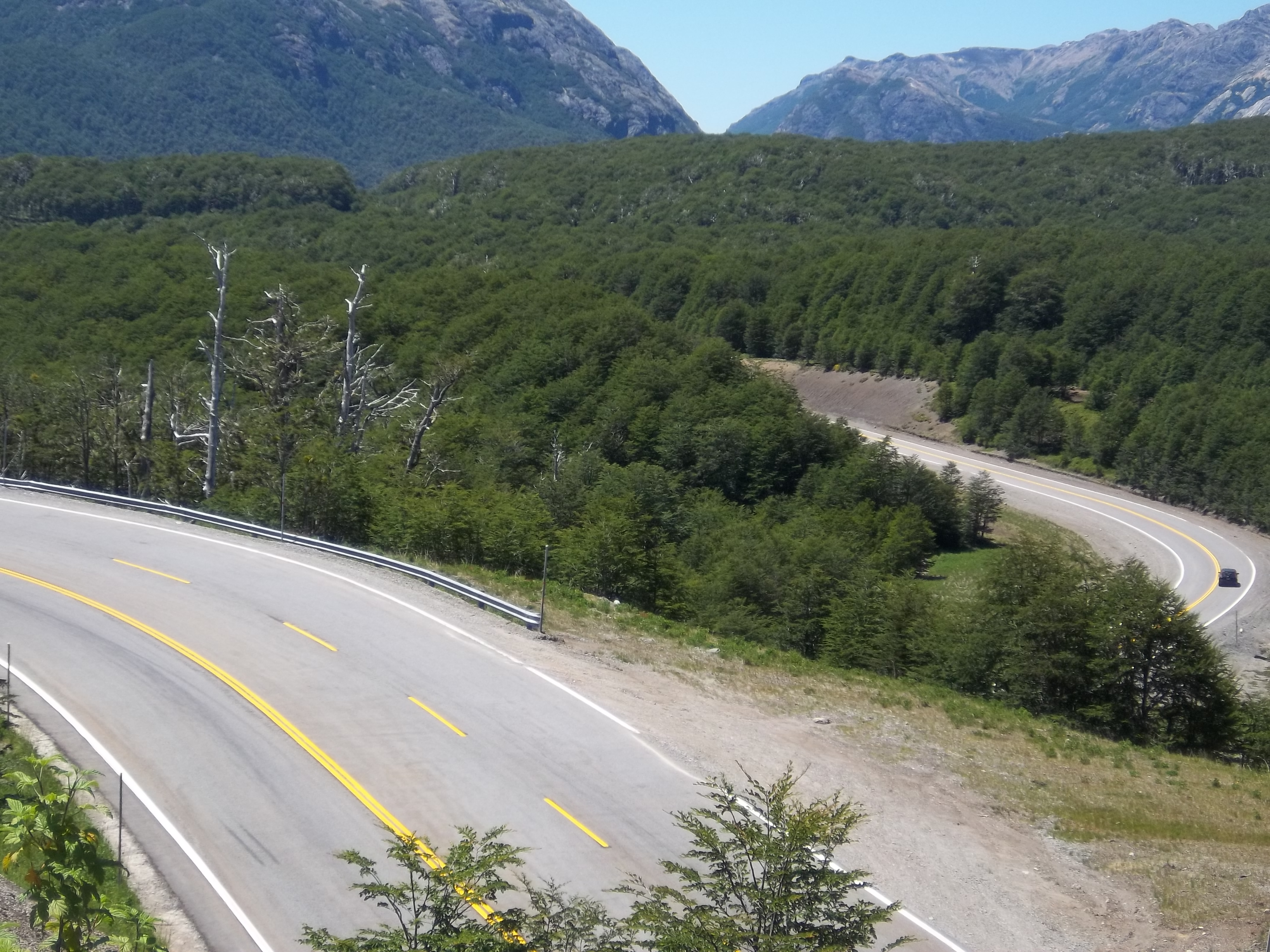 Ruta Nacional 231 desde el mirador del Cerro Pantojo en la provincia del Neuquén, Argentina, cerca del límite internacional con Chile en el paso Cardenal Samoré.